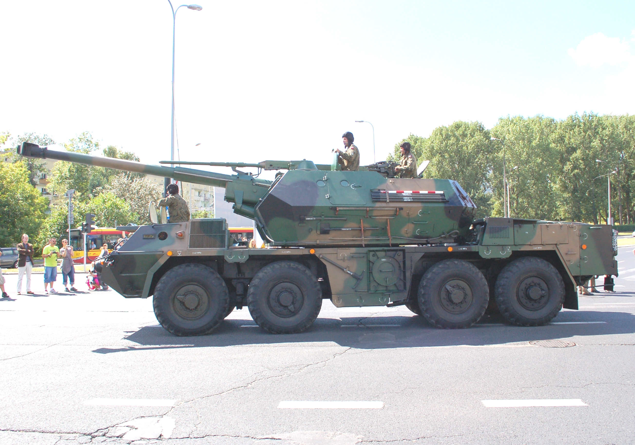 August 15, 2013 military parade in Warsaw